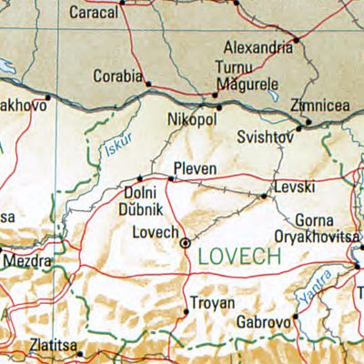 Plewen - Lage des Ortes in Bulgarien